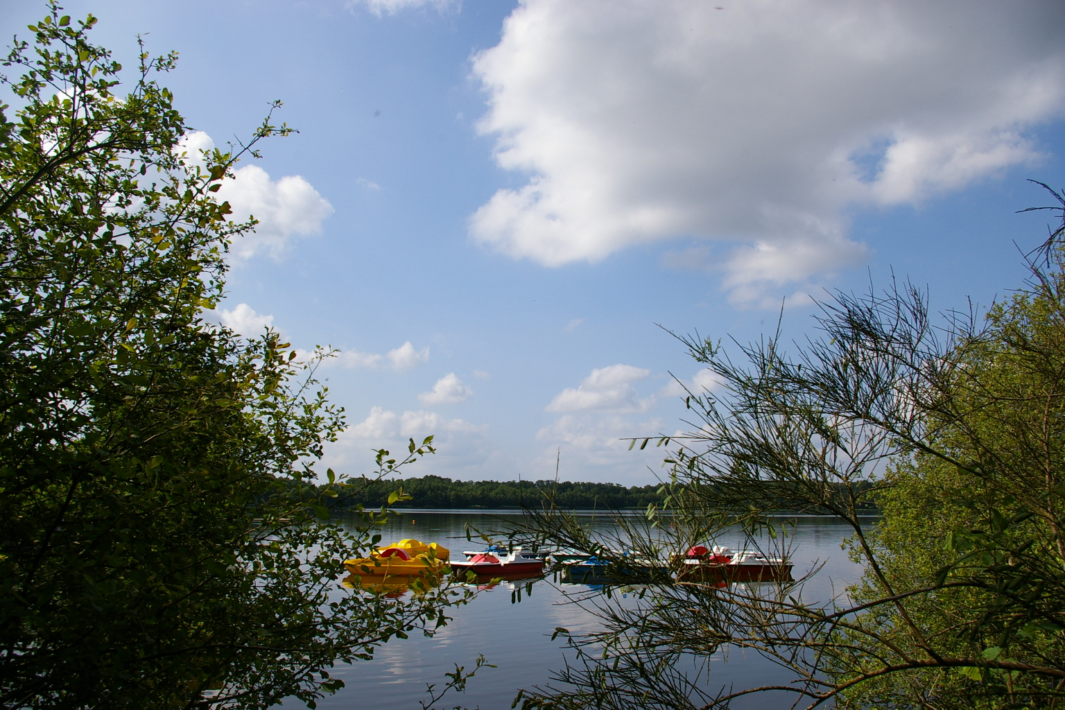 Etang du Gué de Selle Mézangers (Mayenne)